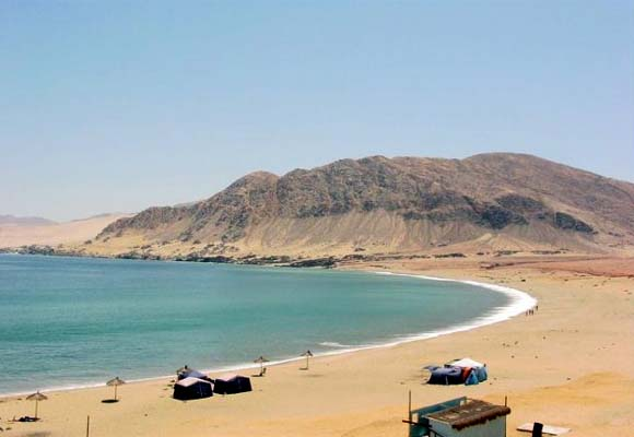 playa cifuncho